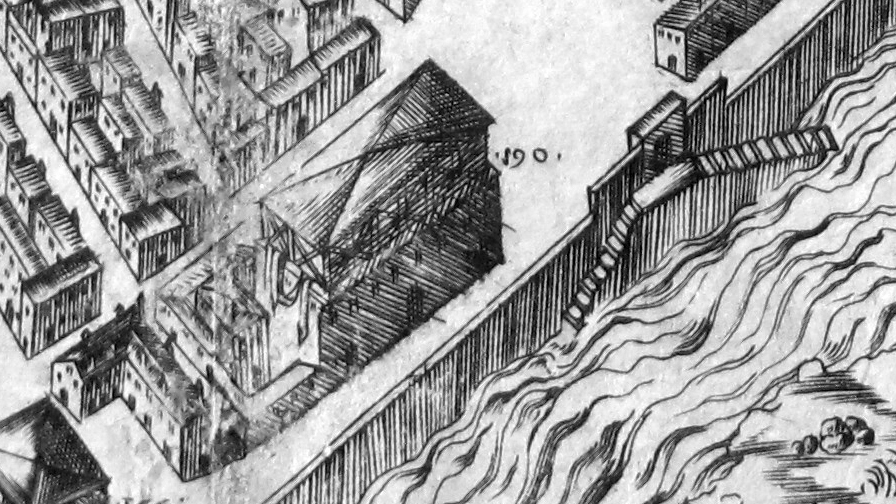 Pianta del buonsignori, dettaglio 190 tiratoio delle gratie (camera di commercio)